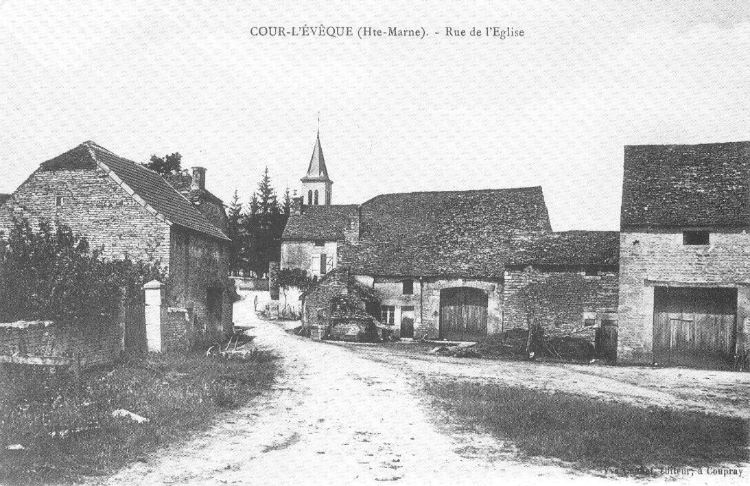 Carte postale ancienne Rue de l'Église à Cour-l'Évêque, Haute-Marne, France